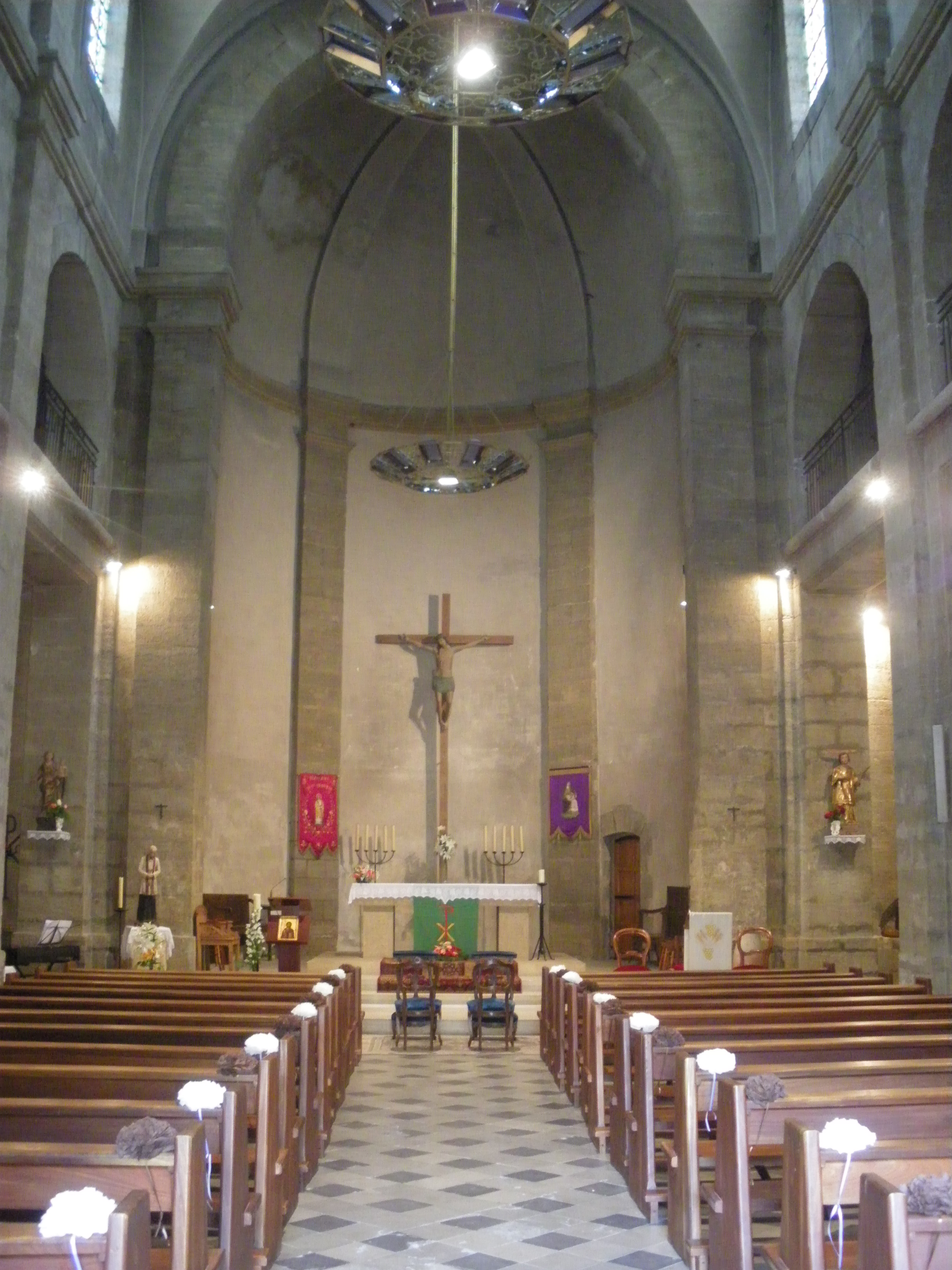 intérieur de l'église de Camaret, Vaucluse